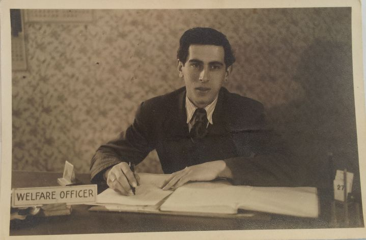 אברהם פטוקה קצין הרווחה של אונרר"א במחנה מעבר בגרמניה